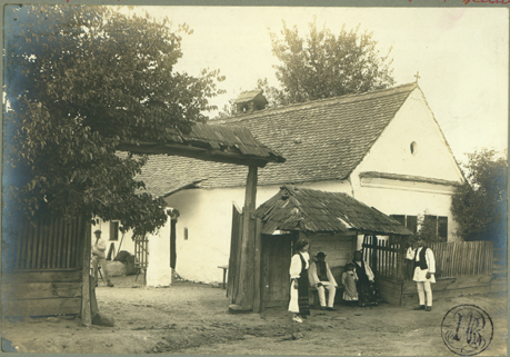 Adler - Casa părintească a aviatorului Vlaicu în Binţinţi